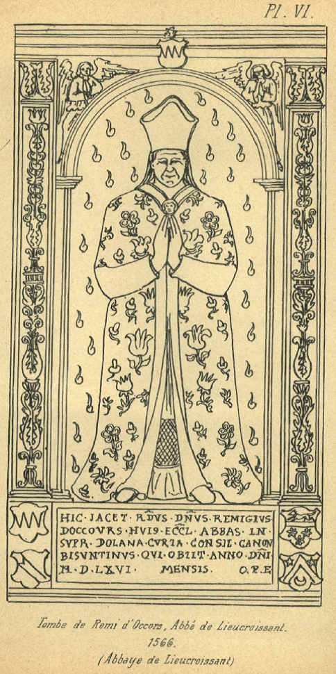 Reproduction de la tombe de l'abbé de Lieu-Croissant Remi d'Occors, mort en 1565, issue de : Jules Gauthier, Nouvelle série de tombes franc-comtoises inédites (XIIIe-XVIIIe siècles), Besançon, Paul Jacquin, 1899.